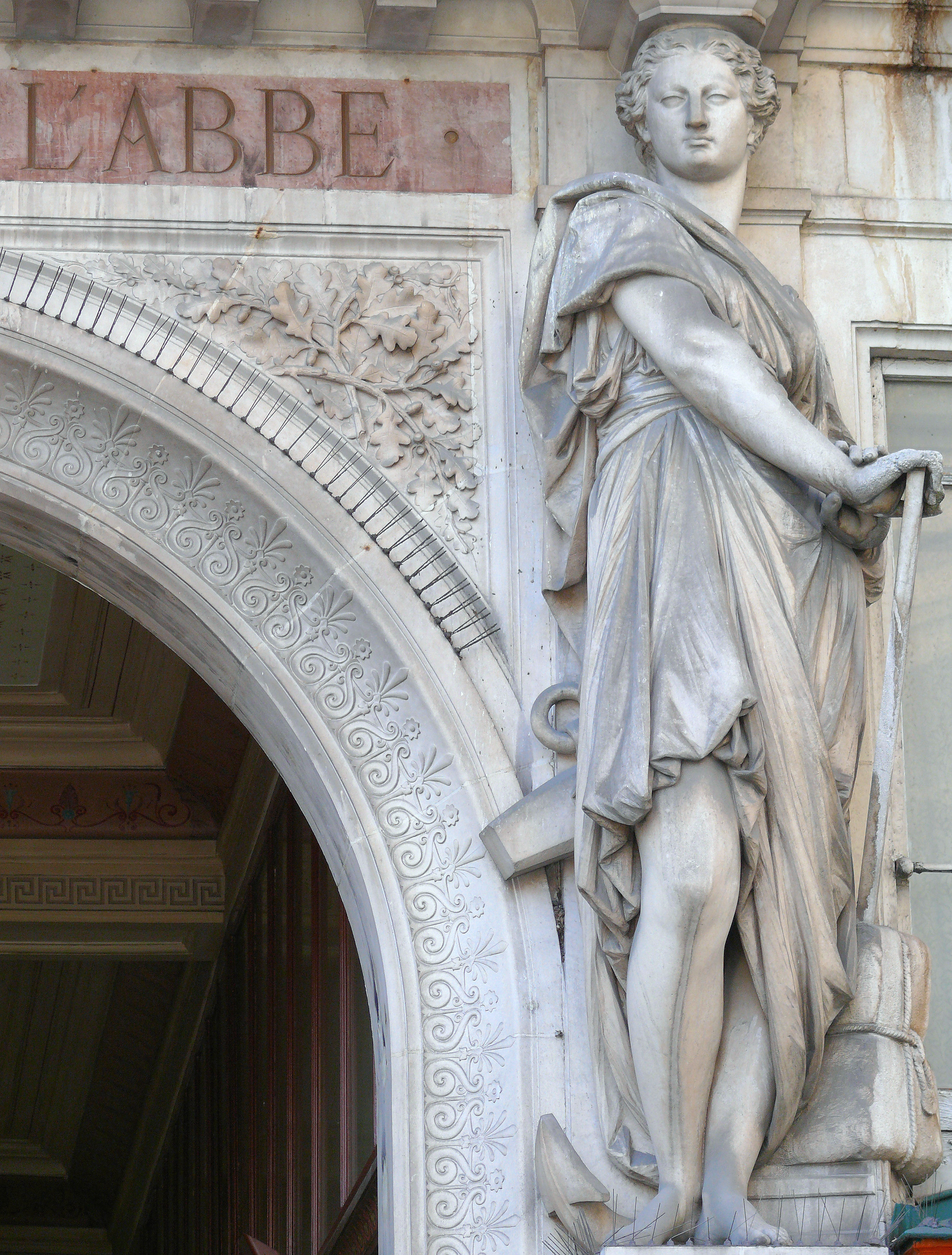 Paris 2e arrondissement - Passage du Bourg-l'Abbé